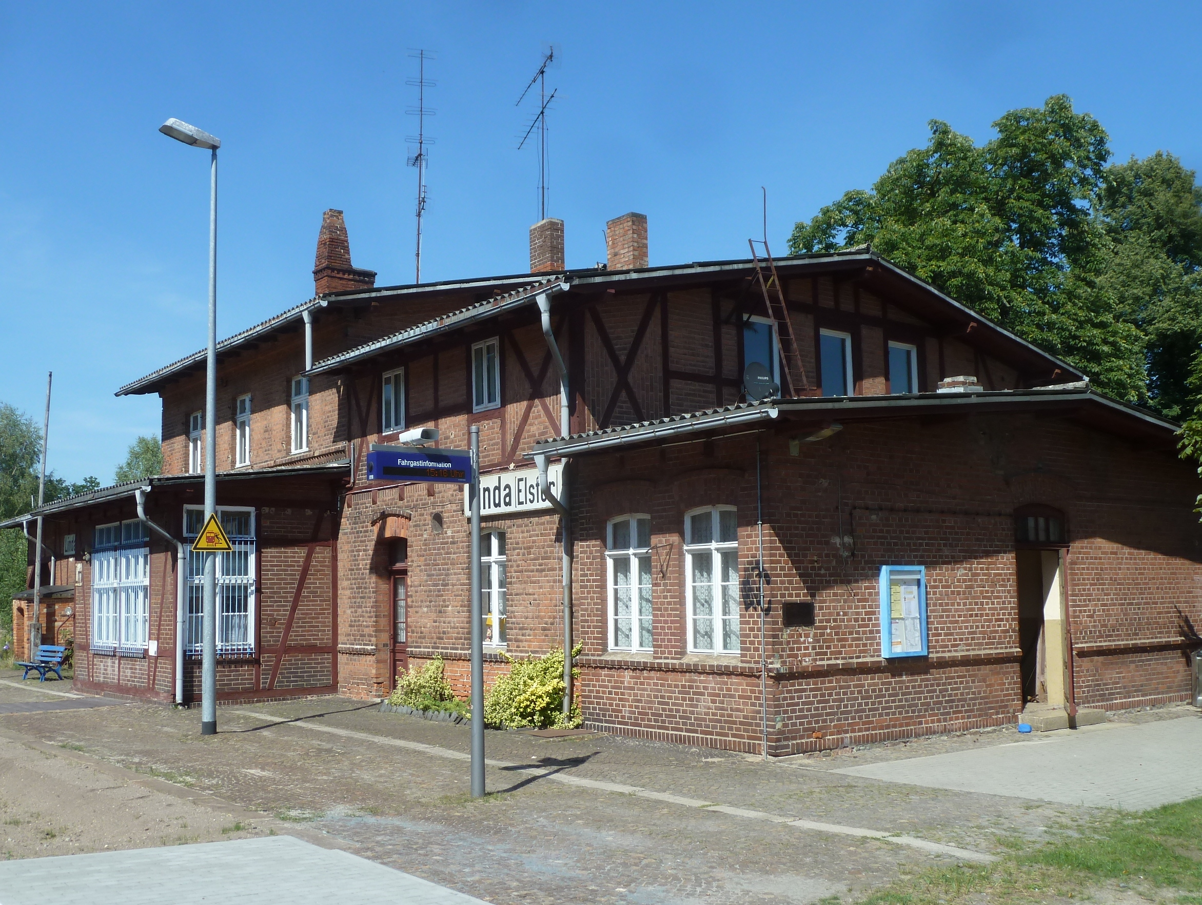 Denkmalgeschützter Bahnhof Linda (Elster). Empfangsgebäude (Bahnsteigseite)